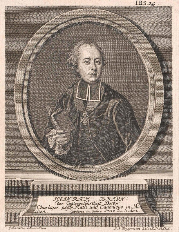 Нохчийн: Heinrich Braun (1732-1792) bayerischer Pädagoge und Benediktiner